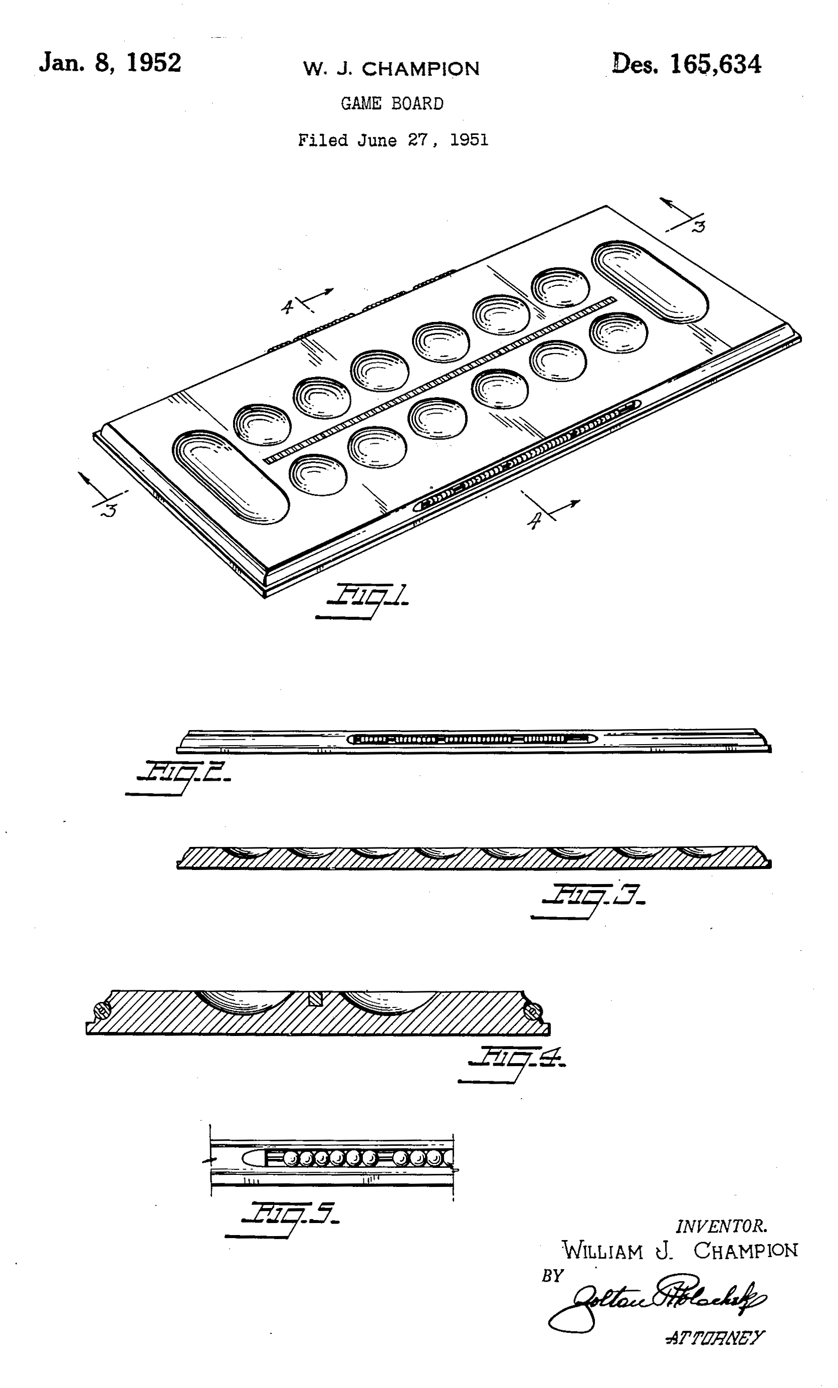 Чертёж доски для игры в калах. Патент US D165634.